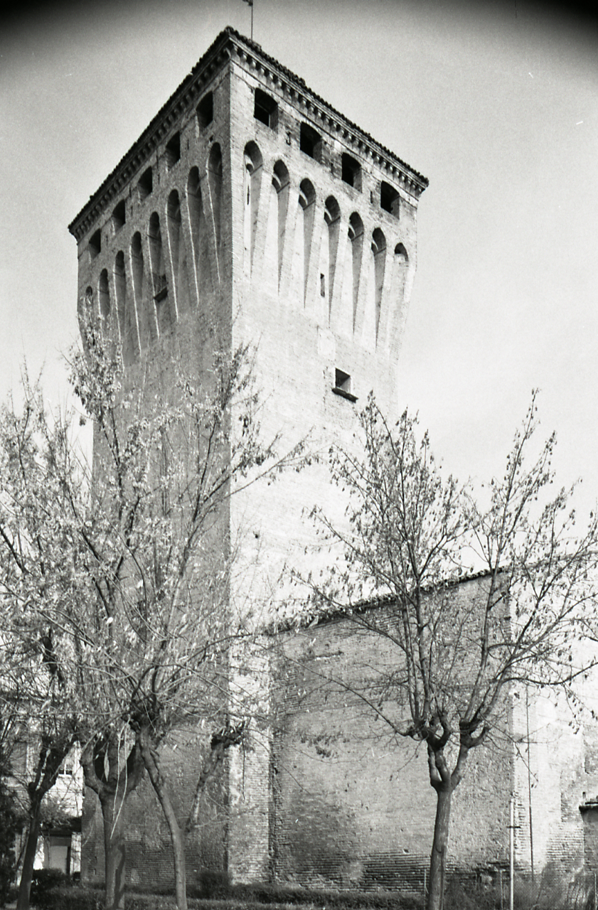 Cento. La Rocca. Esterno: vedute. Regione. Servizio fotografico : Cento, 1975 / Paolo Monti. - Strisce: 2, Fotogrammi complessivi: 9 : Negativo b/n, gelatina bromuro d'argento/ pellicola ; 35 mm. - ((Sul portanegativi: N[I]K[MA]T FP4 e iscrizione didascalica e documentaria manoscritta a penna blu "Rocca di Cento 29)". - All'interno del portanegativi: la serie è anche identificata da una linea orizzontale a pennarello nero che separa la suddetta serie dalla precedente di soggetto diverso. - Occasione: Documentazione del territorio della provincia di Ferrara e centri storici minori. - Fonte: Agenda di Paolo Monti: Leica 1501-3000 Controllo numerazione (1950-1978), presso Archivio Paolo Monti. - Fonte: Fattura di Paolo Monti: IV. Commesse/ Fattura n. 11 (1975/04/29), presso Archivio Paolo Monti. - Fonte: Monografia: Territorio ferrarese: un programma di governo della Regione e delle autonomie locali, catalogo della mostra, Ferrara 1975, a cura di Roberto FREGNA, Modena, Soc. Immobiliare & Poligrafica emiliana (1975)